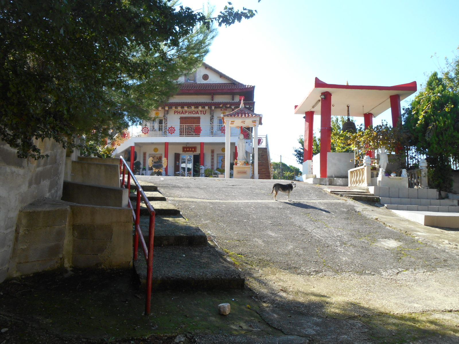 Le chemin de la Pagode